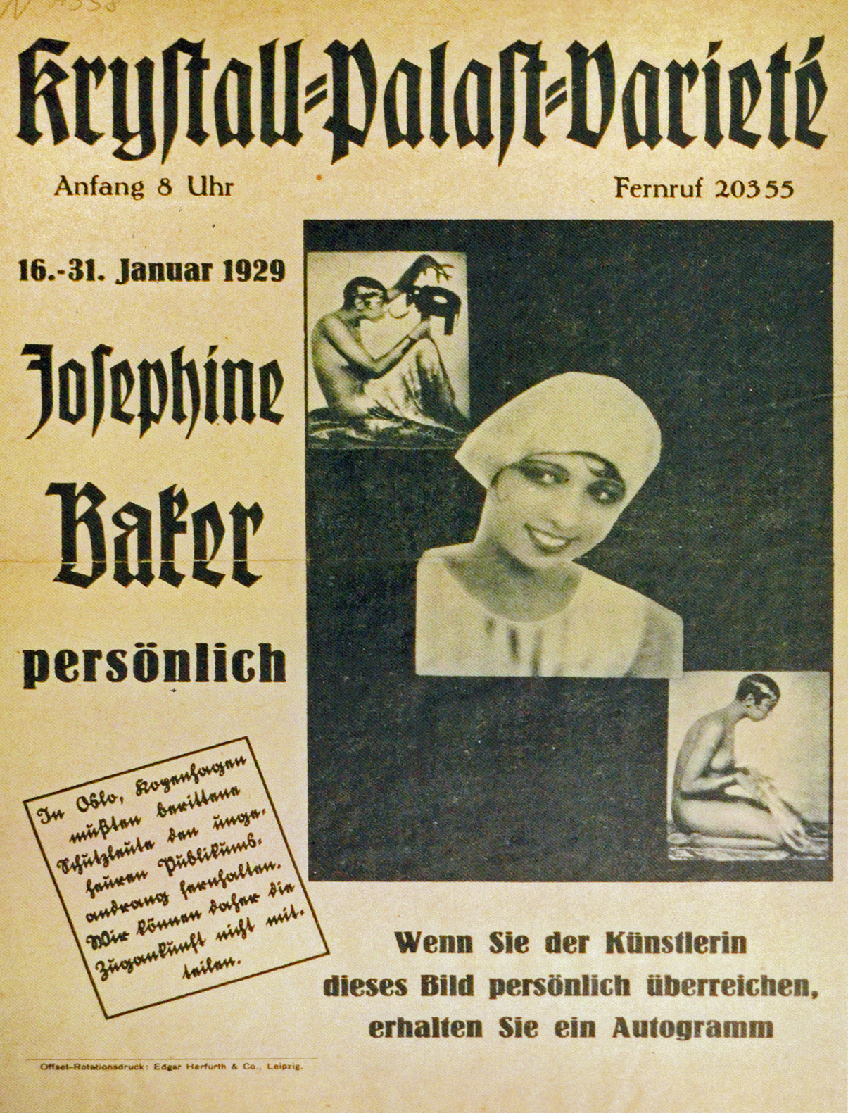 Josephine Baker in Leipzig, Germany, 1929